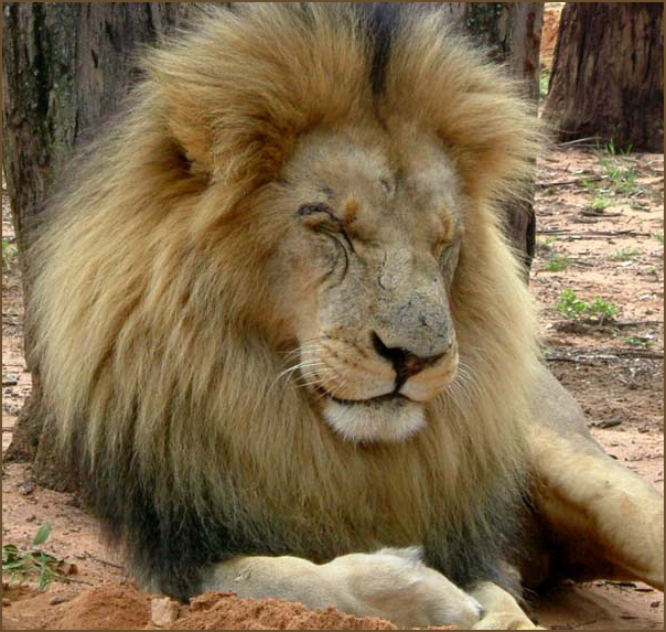 Panthera leo (Dél-Afrikai Köztársaság)